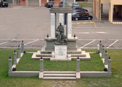 Monumento Rovereto sulla Secchia